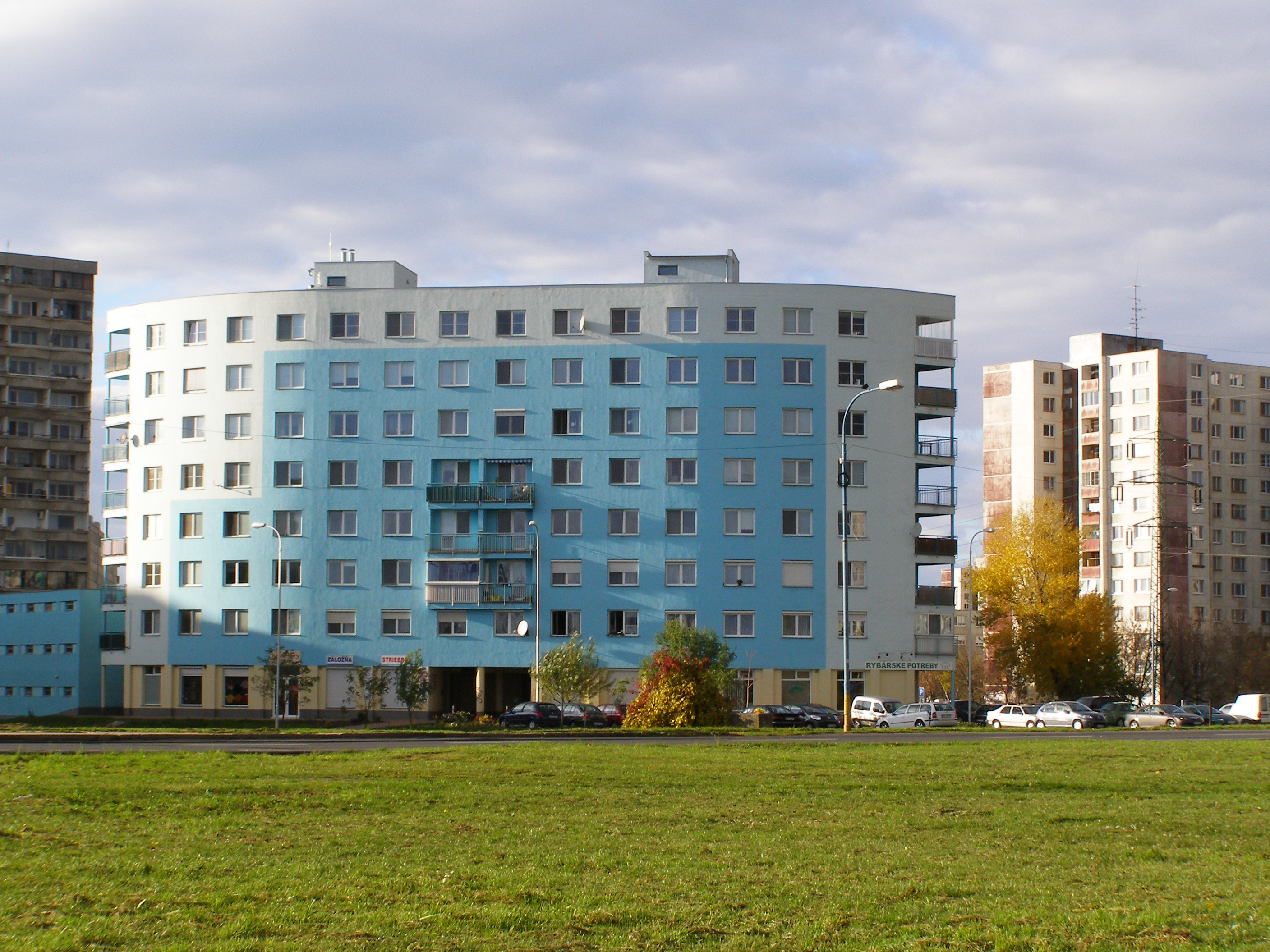 Šintavská street (Modrý dom - Blue House), Petržalka, Bratislava, Slovakia